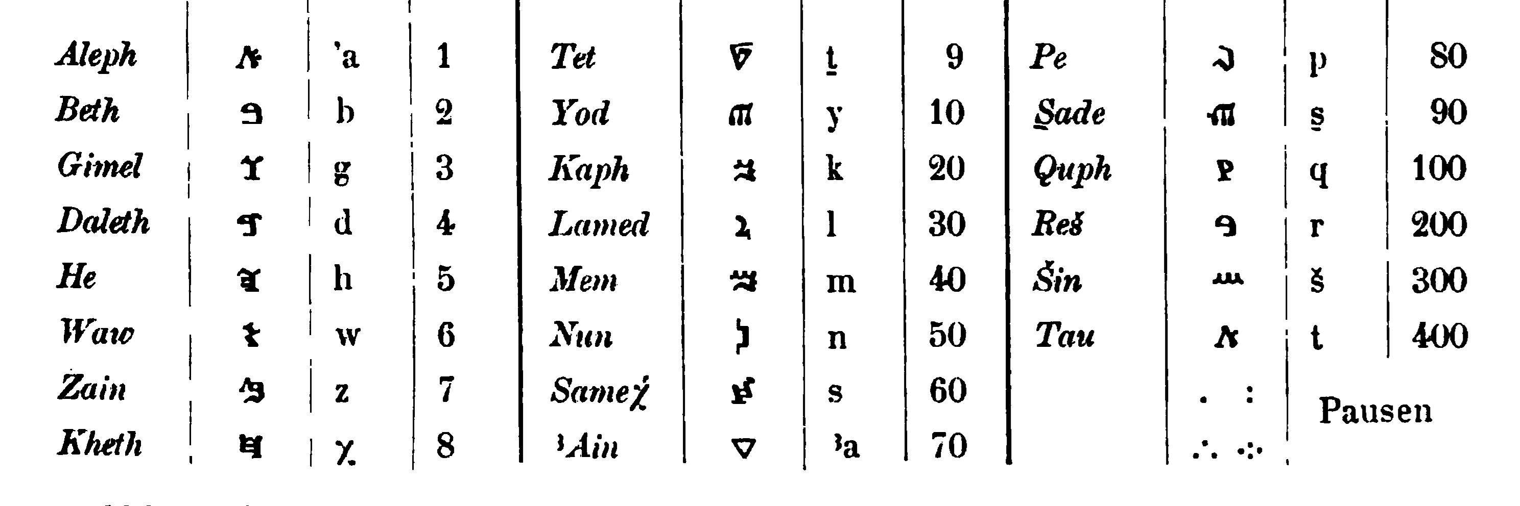 The Samaritan alephbet from Carl Faulmann: Das Buch der Schrift. Enthaltend die Schriftzeichen und Alphabete aller Zeiten und aller Völker des Erdkreises. Zweite vermehrte und verbesserte Auflage 1880, page 79